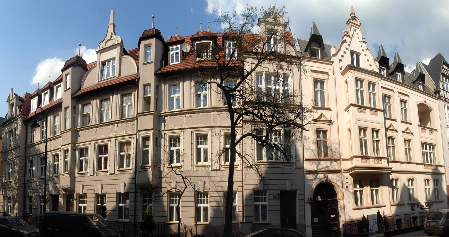 Kamienice ul. Cieszkowskiego 14-20 Bydgoszcz